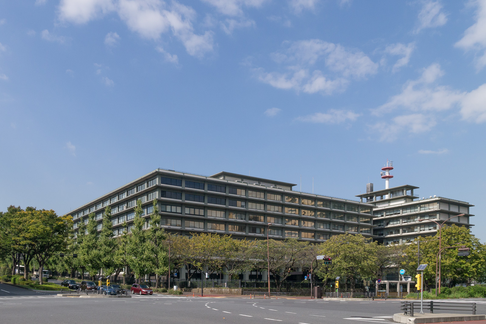 外務省、東京都千代田区霞が関。